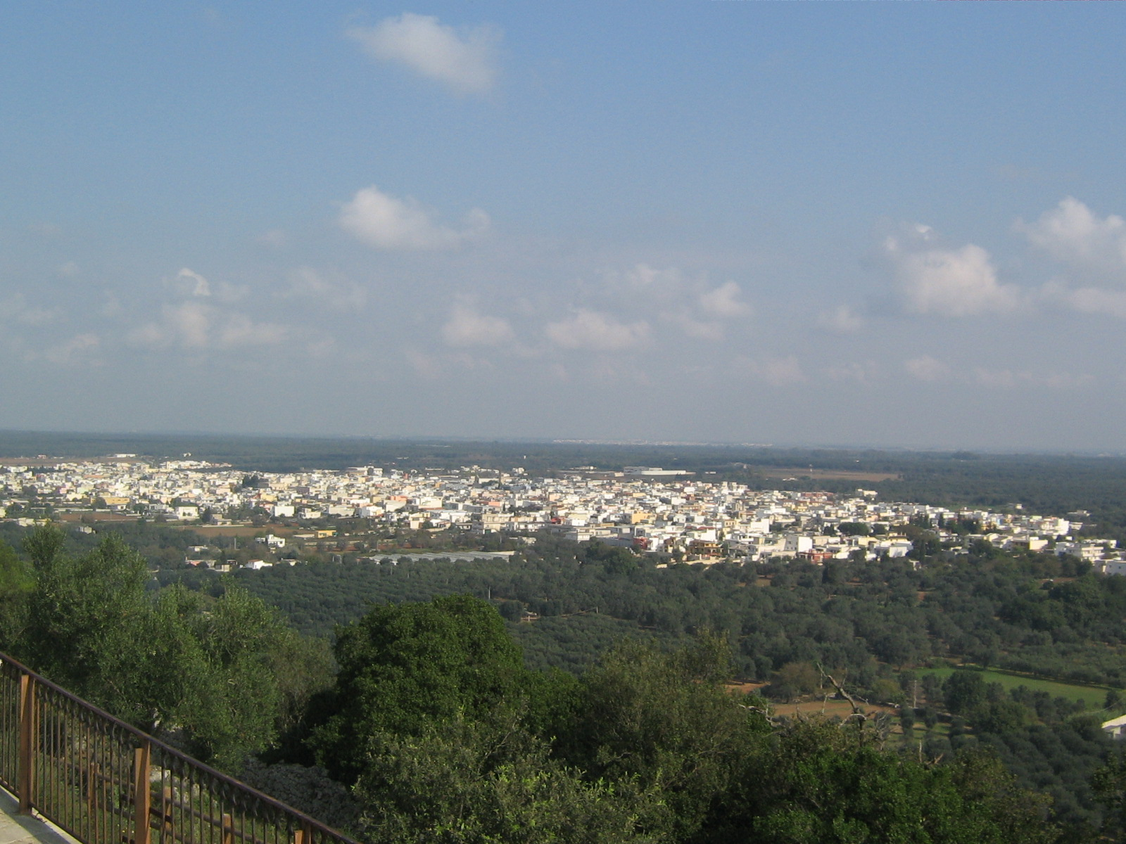 Panorama di Supersano